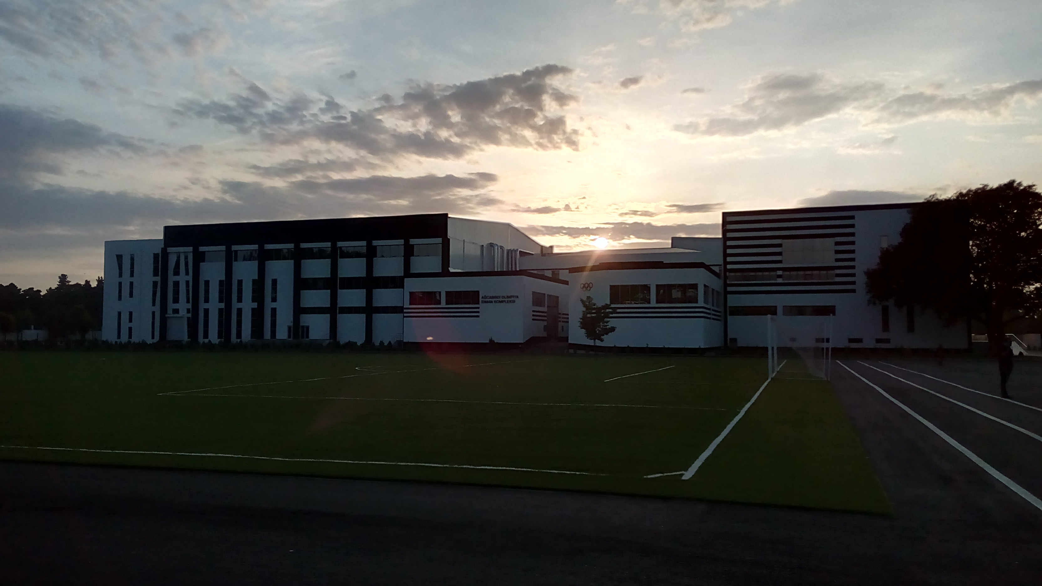 Ağcabədi OİK